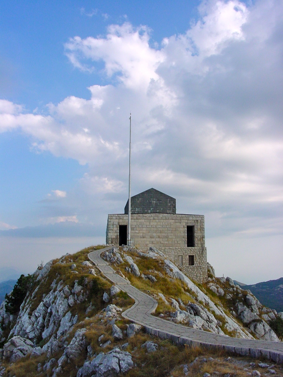 Mavzolej na Lov?enu